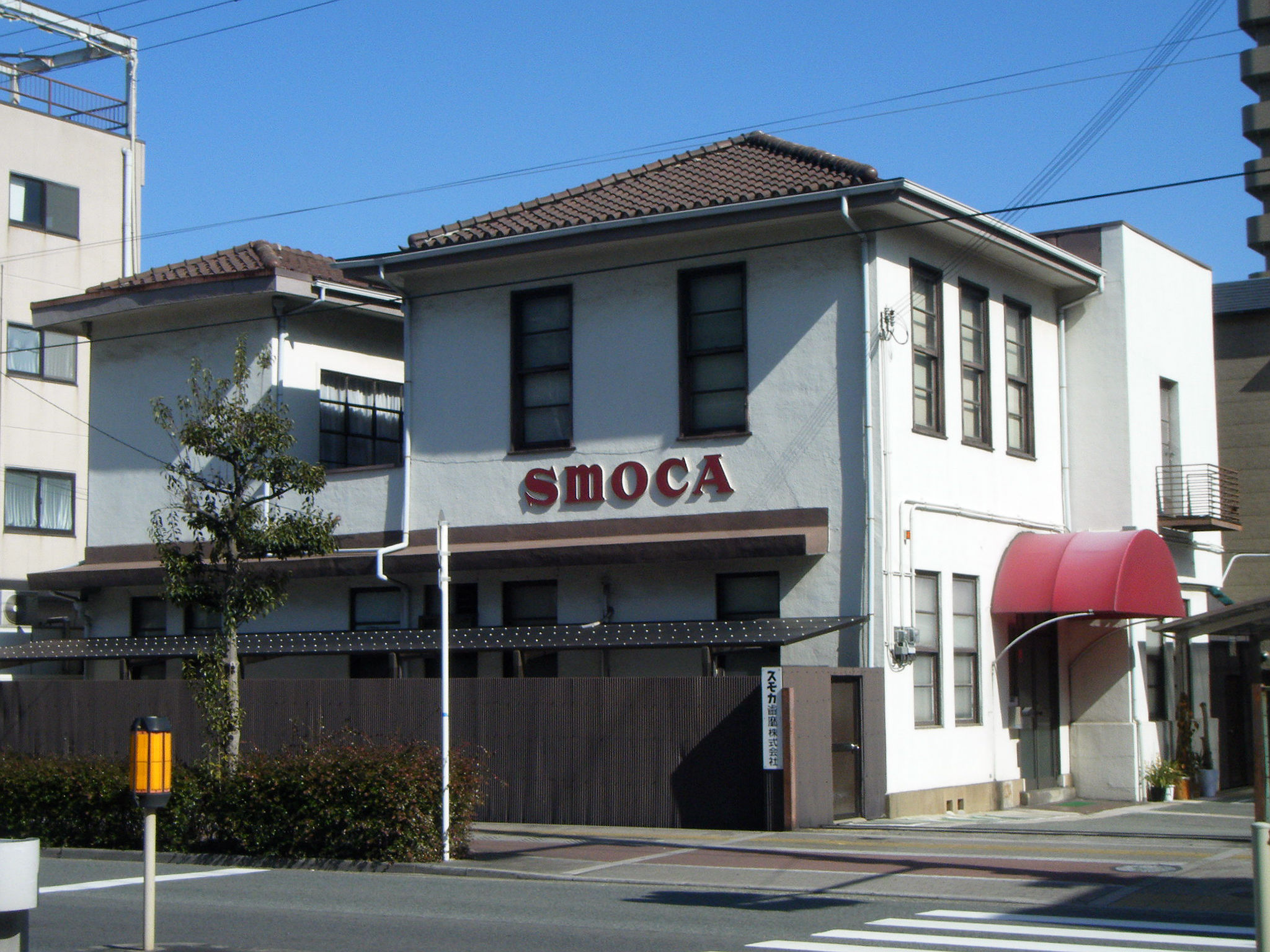 スモカ歯磨 本社